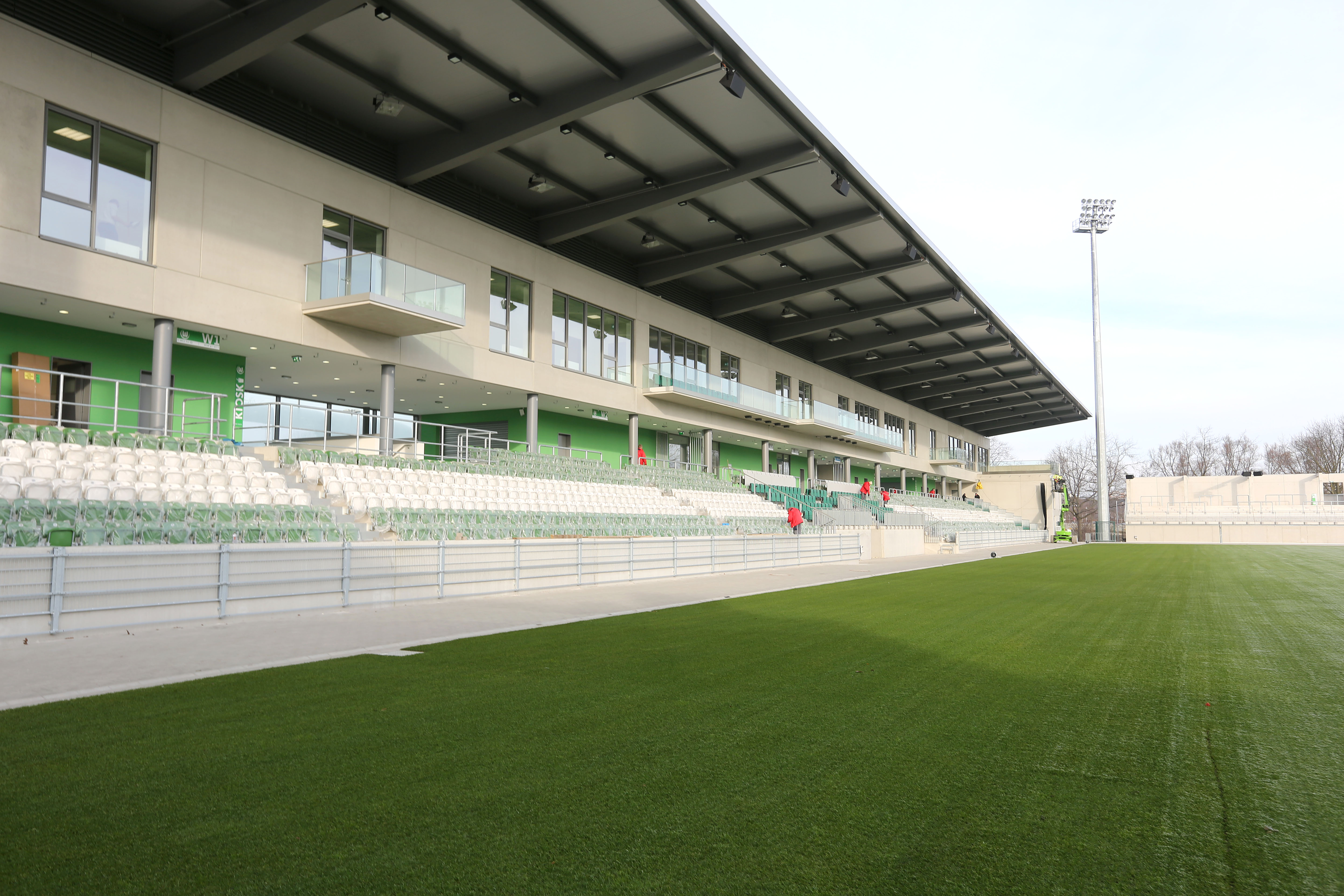 Haupttribüne des AOK Stadions